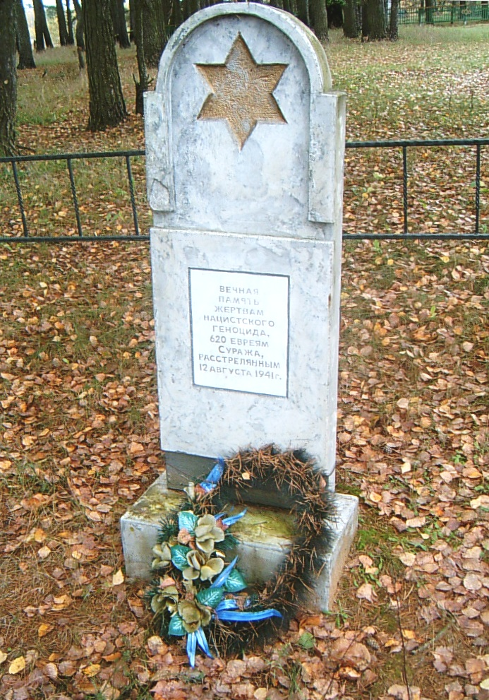 Памятник евреям гетто посёлка Сураж (Витебская область), убитым в августе 1941 года.